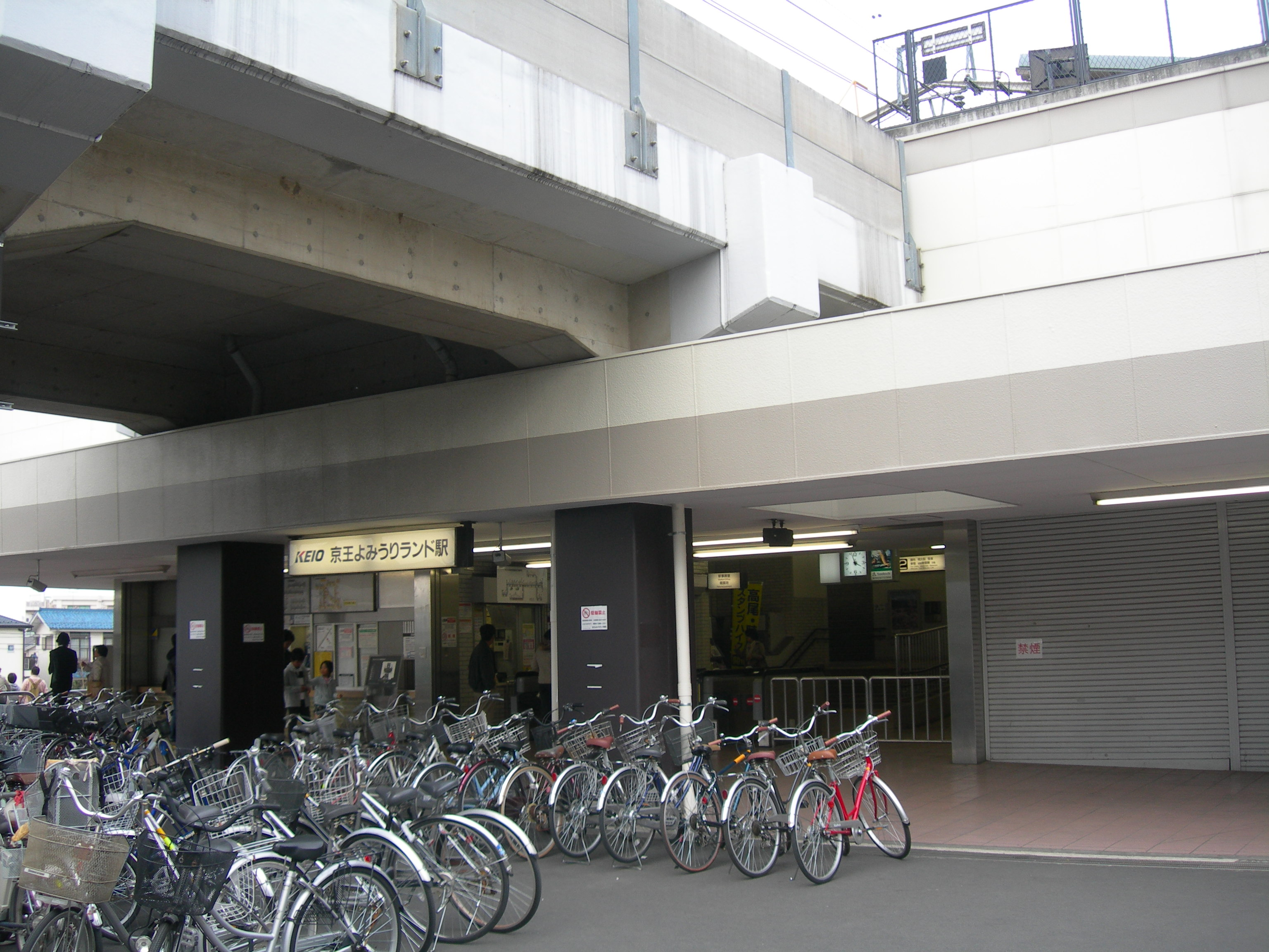 京王よみうりランド駅